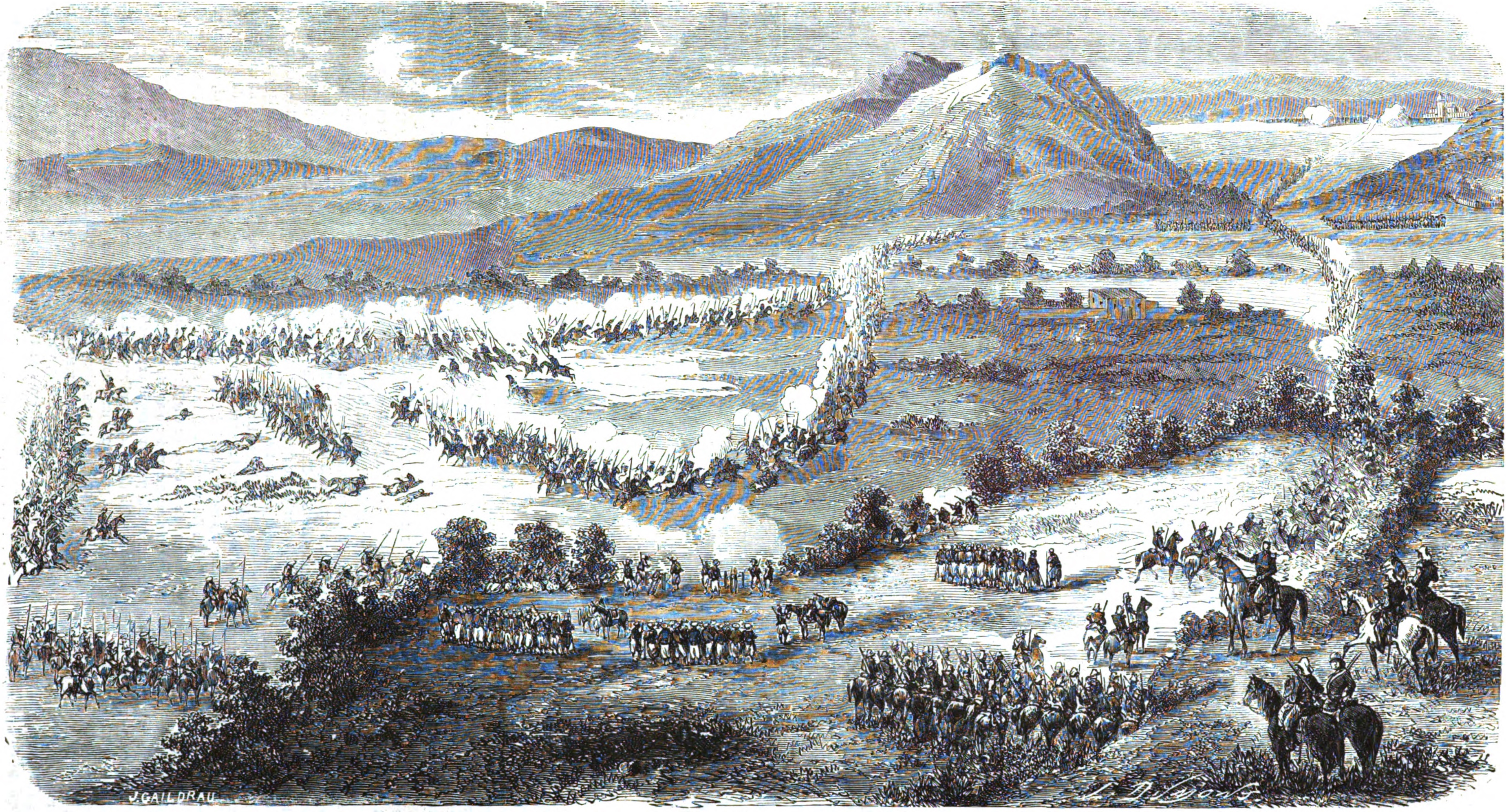 Expédition du Mexique. — ensemble topographique du Combat d'Atlisco. — D'après un croquis de M. Girardin.